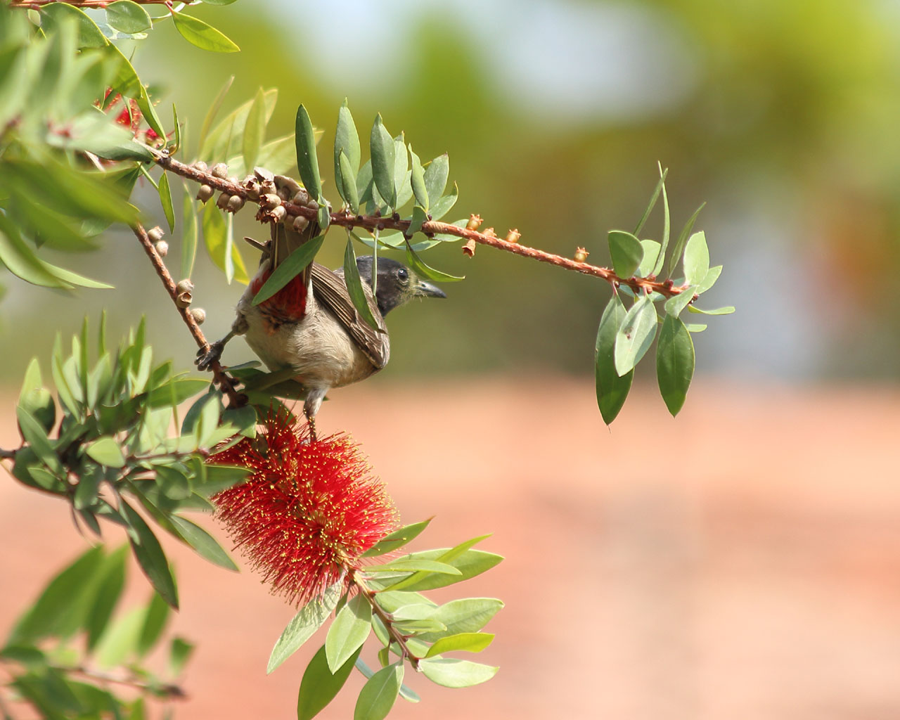 Bulbul à ventre rouge, Tadoba (Inde)